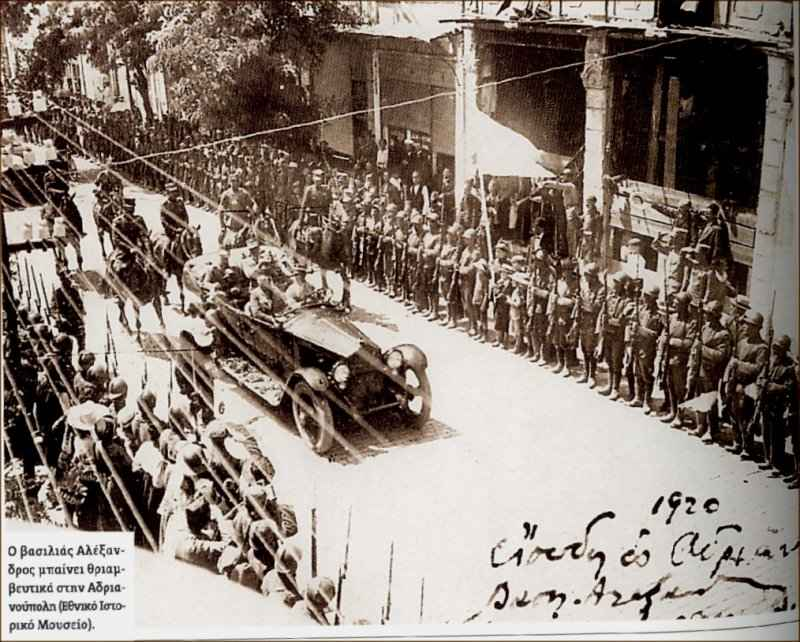 Yunan Ordusunun Edirne'ye girişi (12 Temmuz 1920)